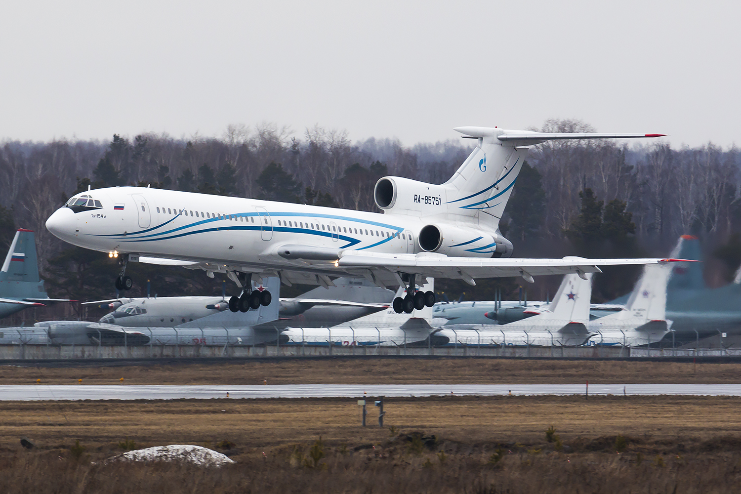 SVX/USSS